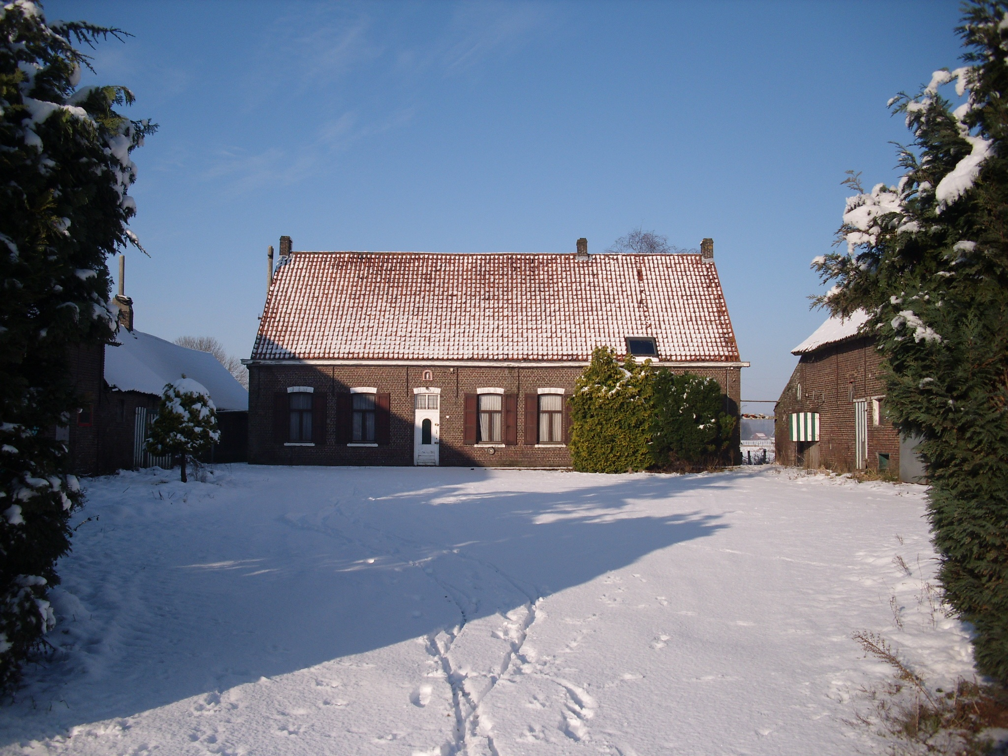 De woning uit 1895 van het Woestijnegoed - Woestijne 25 - Aalter - Oost-Vlaanderen - Vlaanderen - België